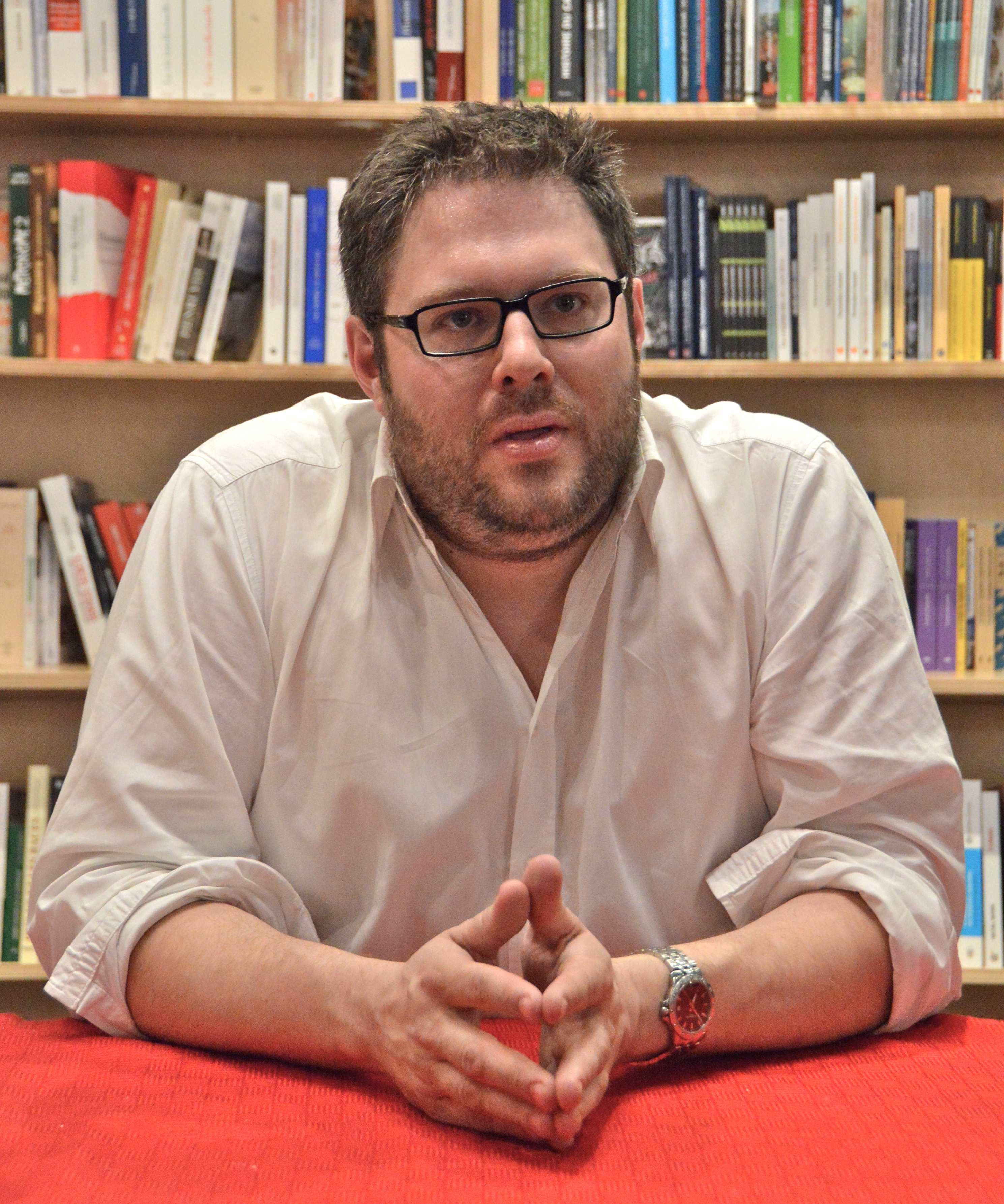 Mathieu Bock-Côté, présentant son livre Le Nouveau Régime - Essais sur les enjeux démocratiques actuels, à la librairie du Quartier, à Québec